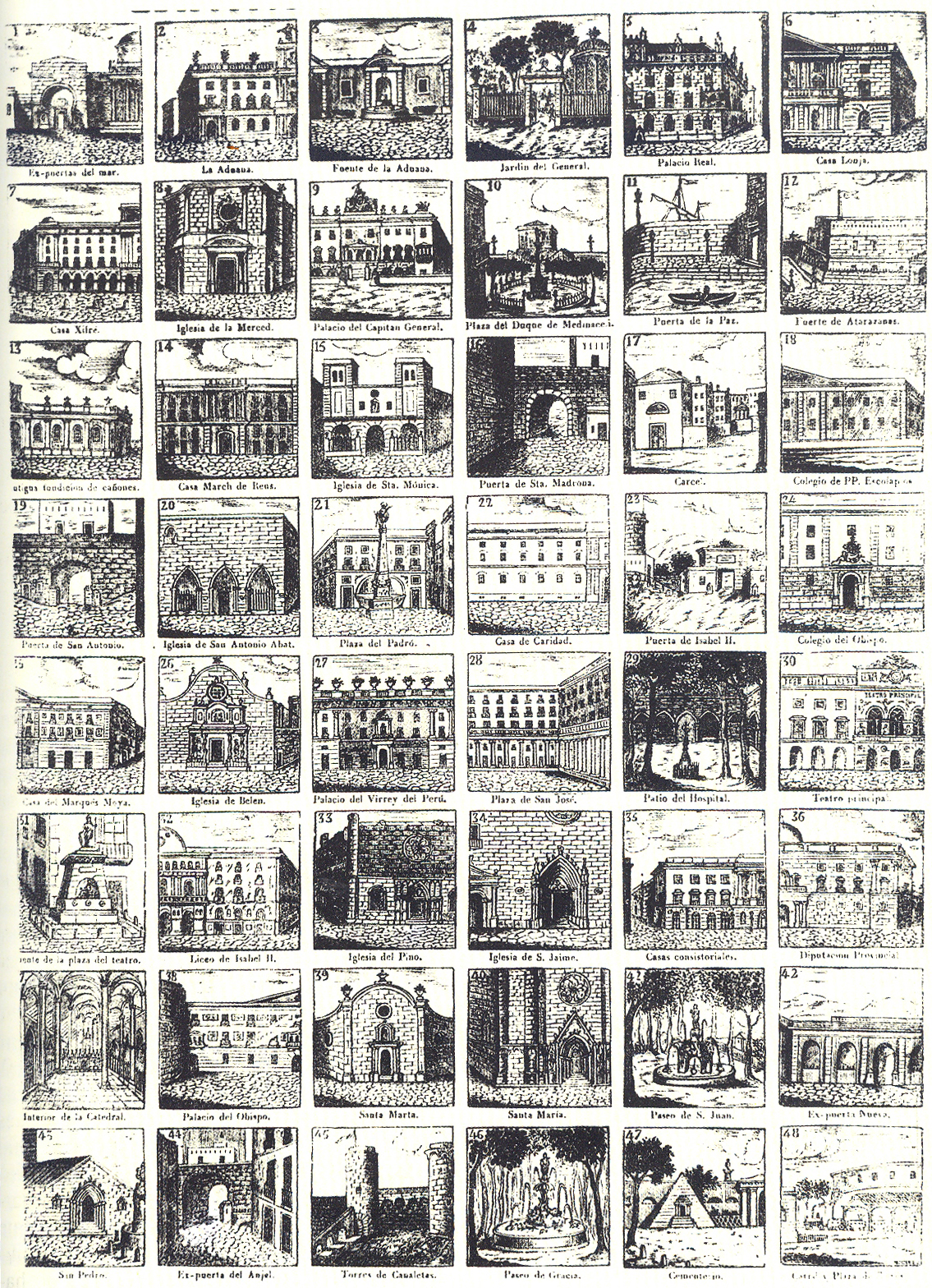 Auca de edificios notables de Barcelona (1861).